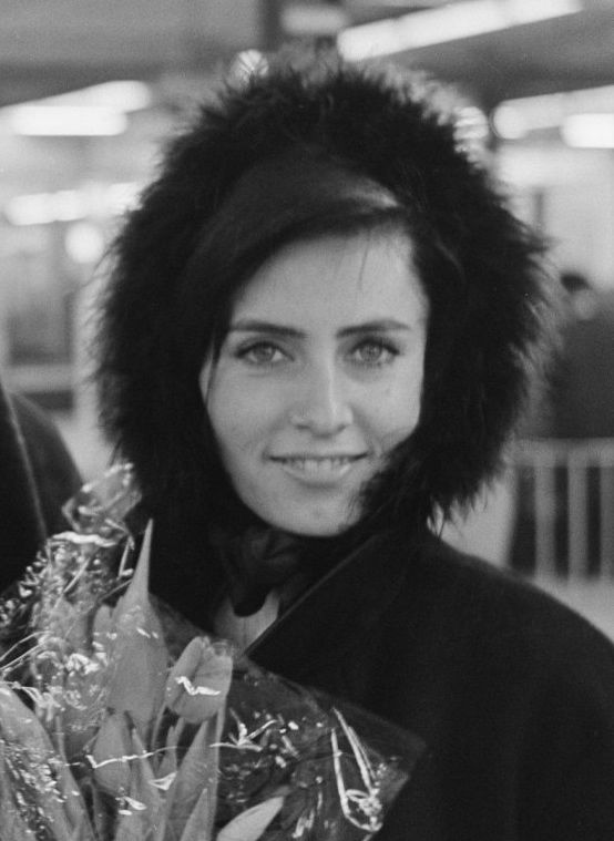 Janine Magnan à l'aéroport d'Amsterdam Schiphol le 31 janvier 1966